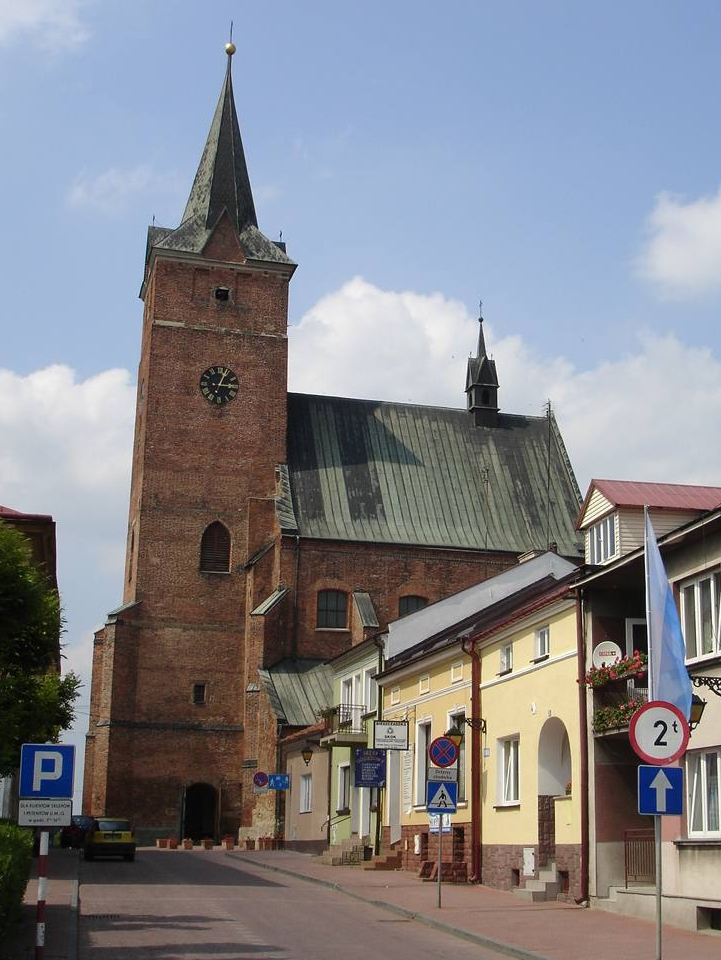 Gotycki kościół parafialny św. Jana Chrzciciela z XIV-XVI w.